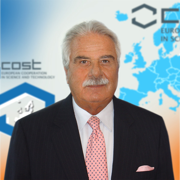 Prof. Ing. Francesco Fedi